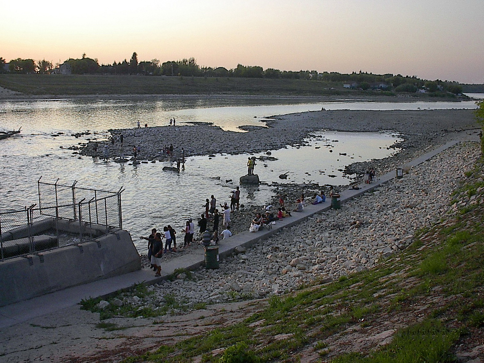 Lockport Locks, Manitoba, Canada